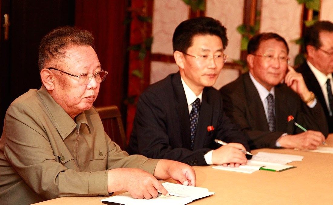 Во время российско-северокорейских переговоров.